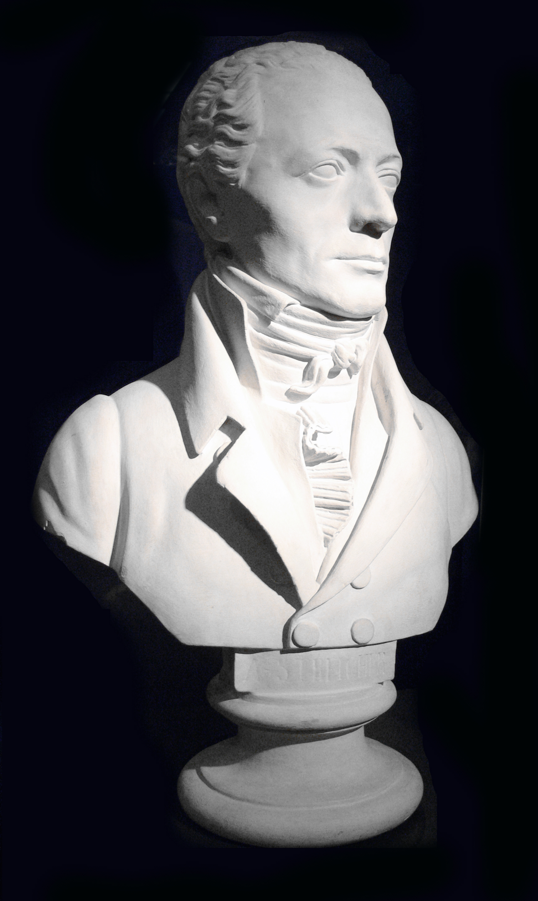 Johann Andreas Streicher (Freund Friedrich Schillers), Büste von Franz Klein (1777–1840), Gips Gallery: Reiss-Engelhorn-Museen, Mannheim